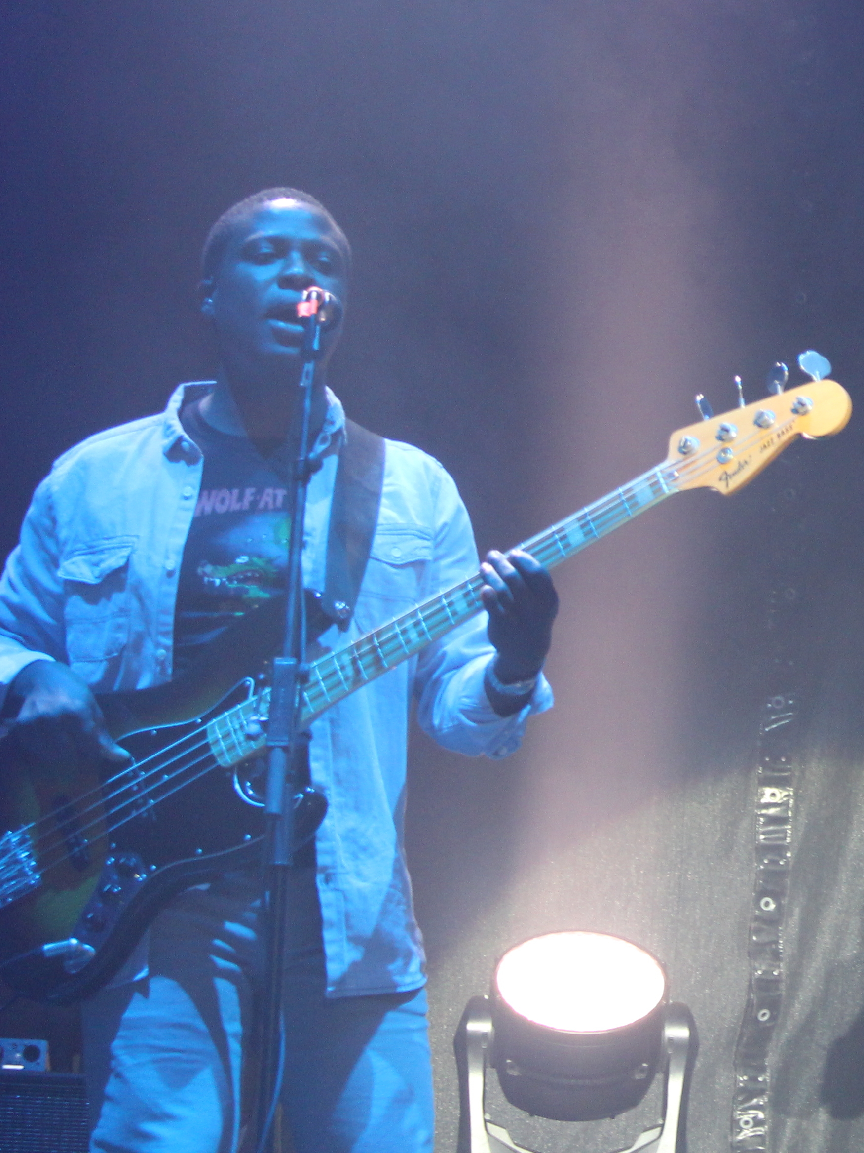 Festivalsommer This photo was created with the support of donations to Wikimedia Deutschland in the context of the CPB project "Festival Summer". Personality rights warningAlthough this work is freely licensed or in the public domain, the person(s) shown may have rights that legally restrict certain re-uses unless those depicted consent to such uses. In these cases, a model release or other evidence of consent could protect you from infringement claims.